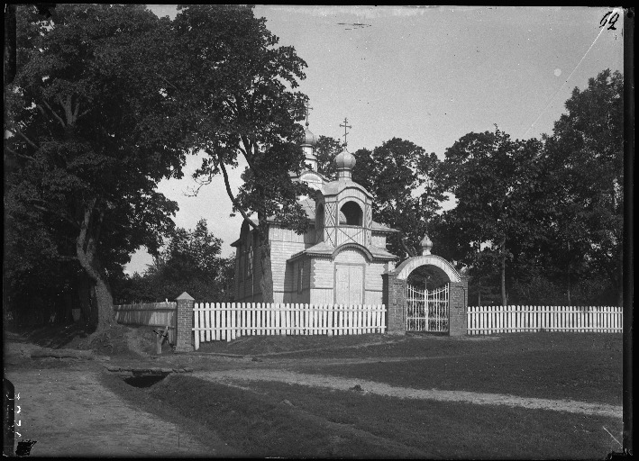 Беларуская (тарашкевіца): Зубкі (Zubki). Царква-мураўёўка